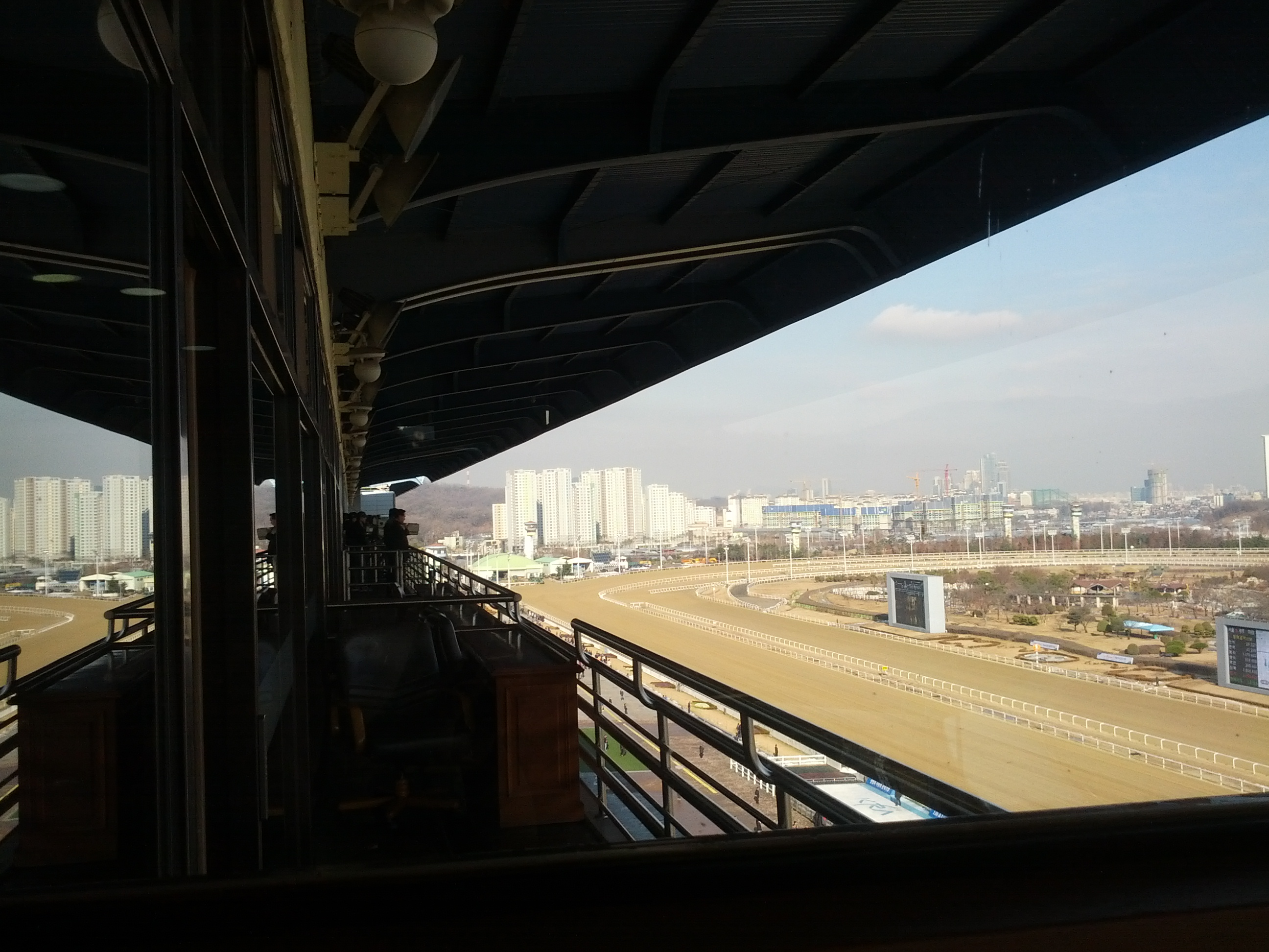 서울경마공원 6층